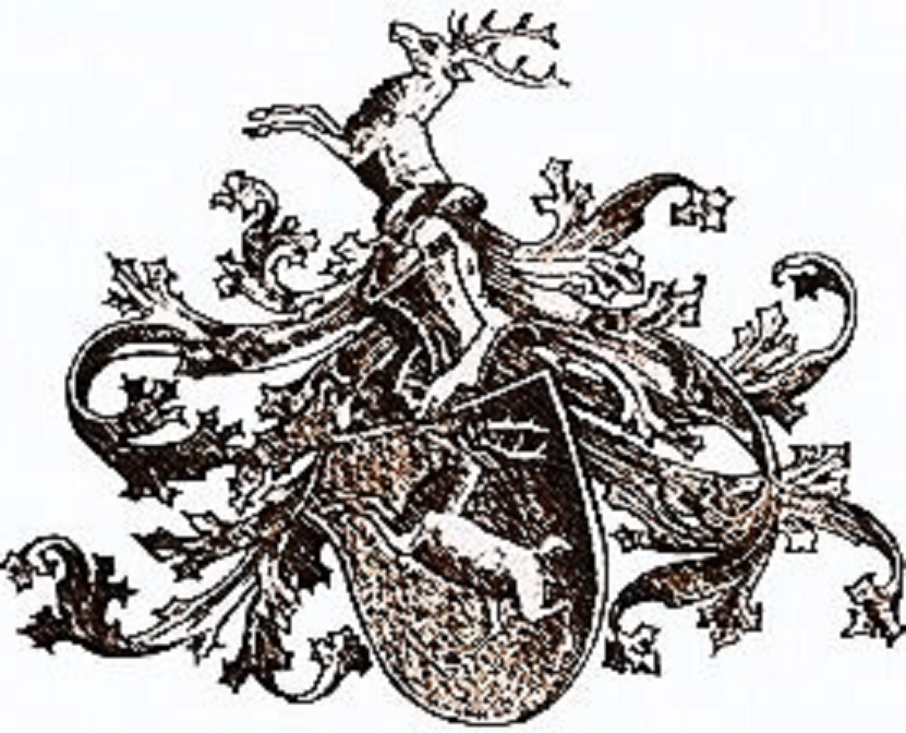 Wappen der Tempelhof(f); Geschlecht aus der Mark Brandenburg; ein Zweig im Jahr 1784 in den erblichen preußischen Adelstand erhoben.